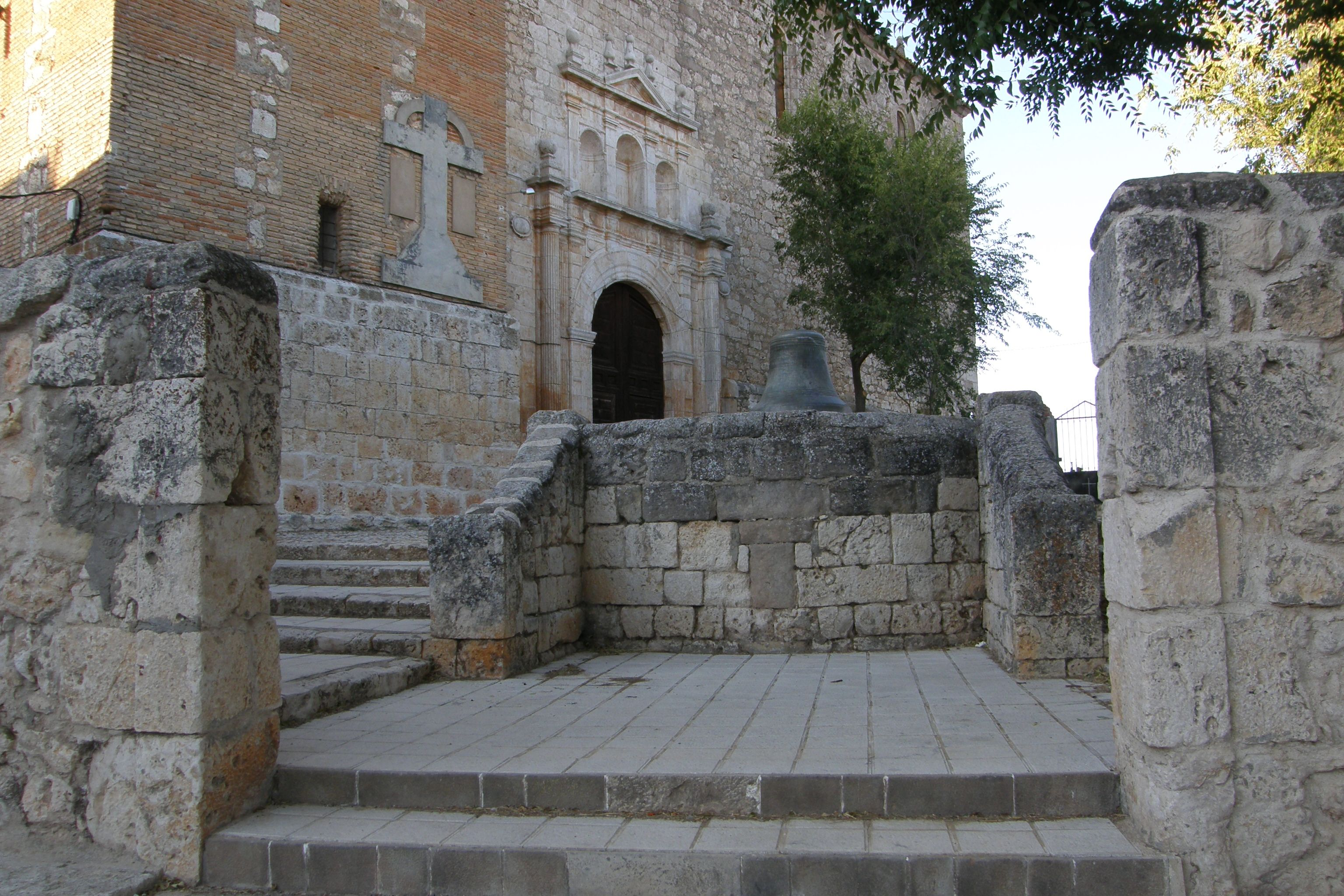 Portada Iglesia y campana